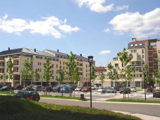 Place Fischart - Ville Haute